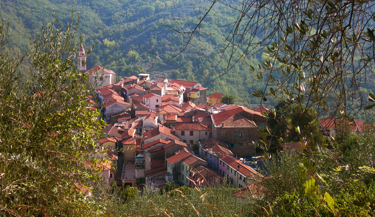 Aurigo visto da nord.